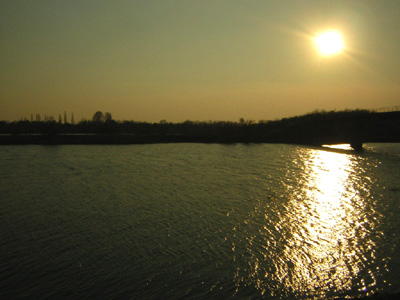 Kанал Дунав-Тиса-Дунав код Беле Цркве